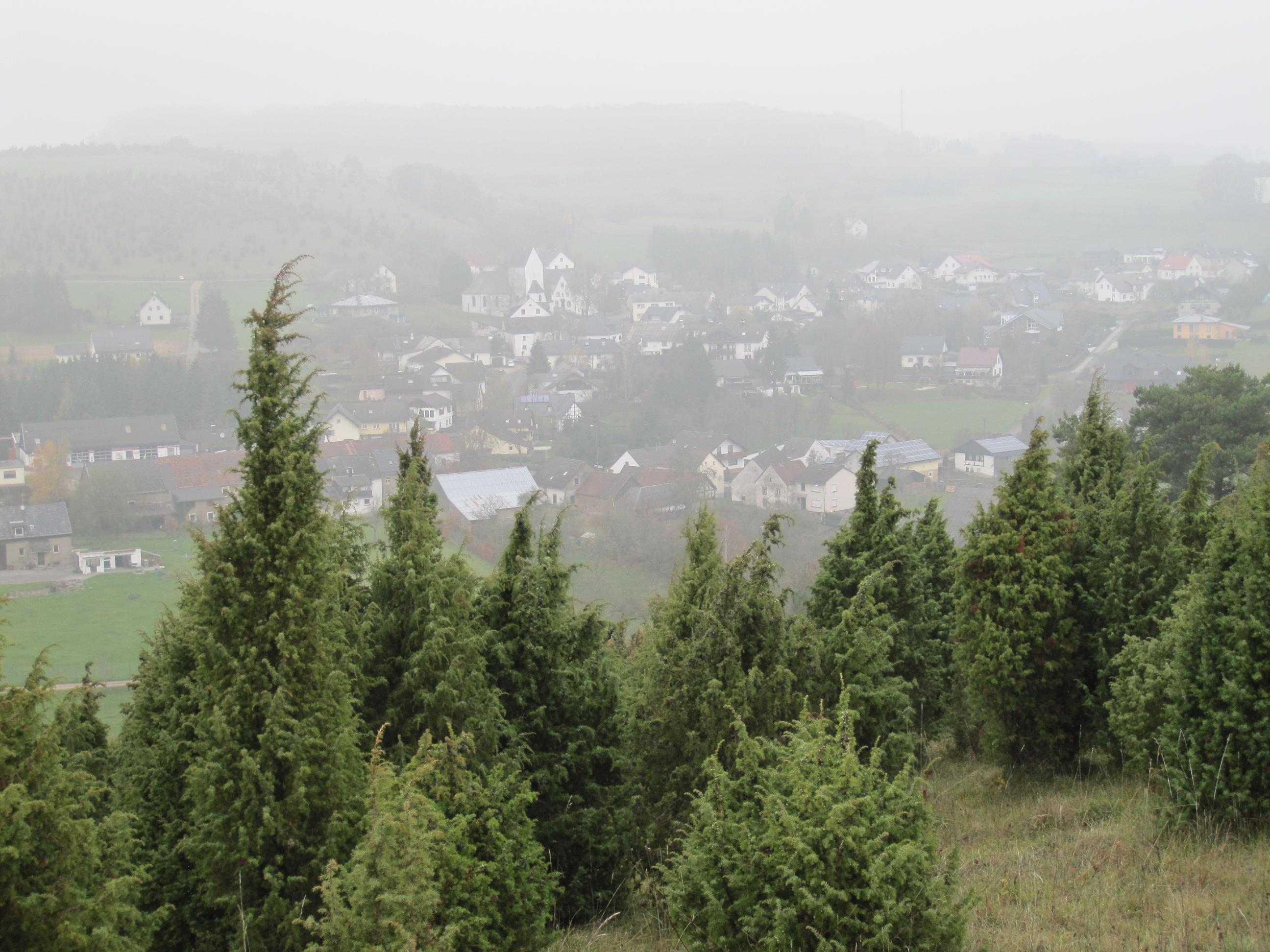 Alendorf bei leichtem November-Nebel